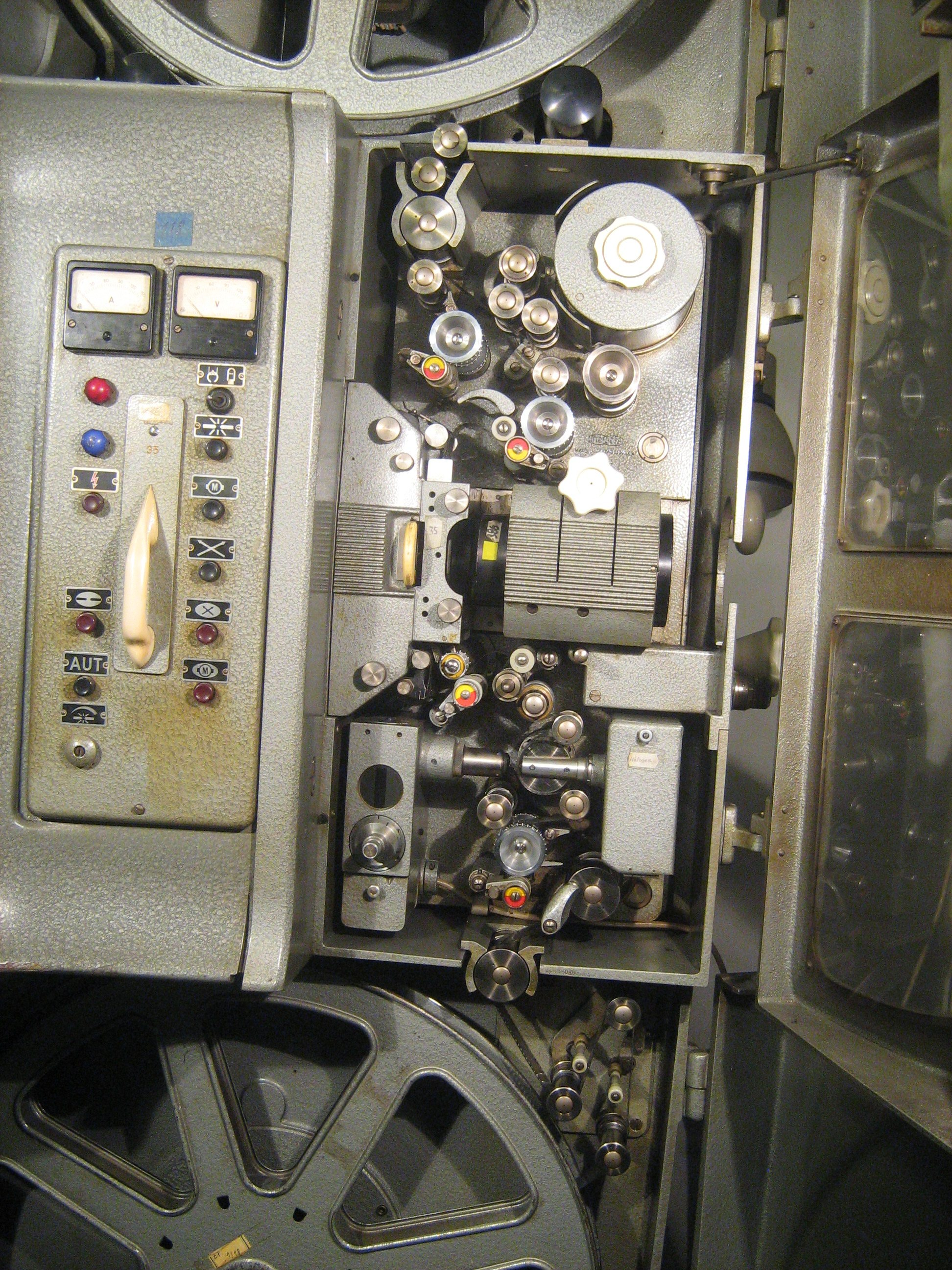 Meopton UM 70/35 - filmová dráha